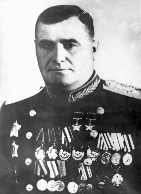 Дважды Герой Советского Союза Андрей Григорьевич Кравченко.